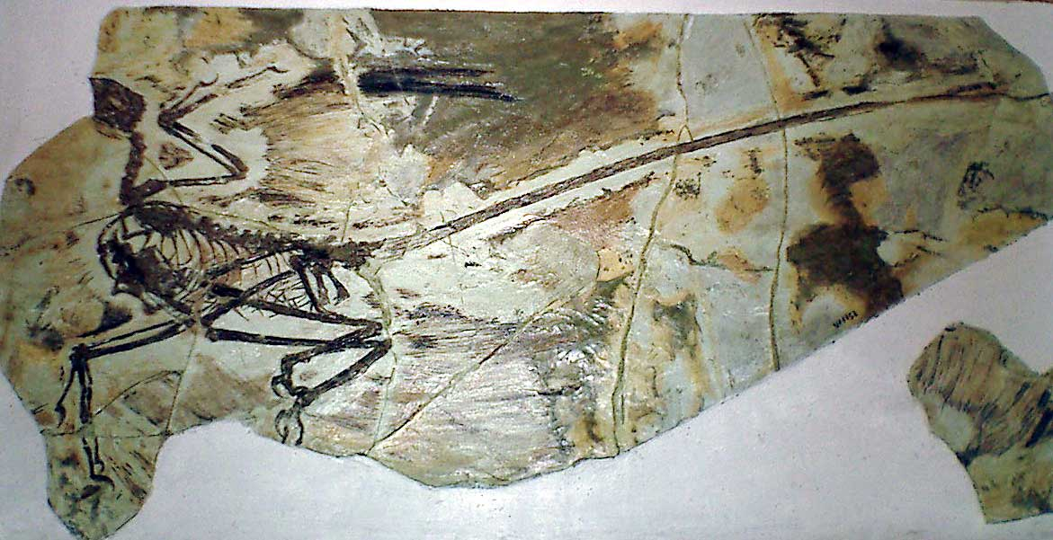 dinosaur: Microraptor gui